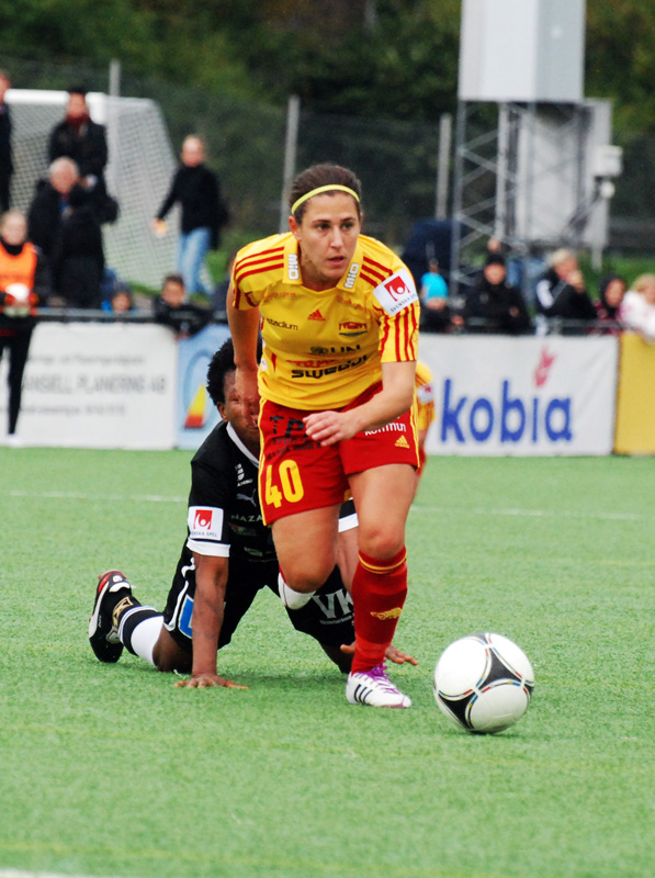 a_41_0057